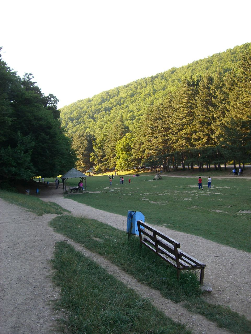 Gërmia Park, Prishtina